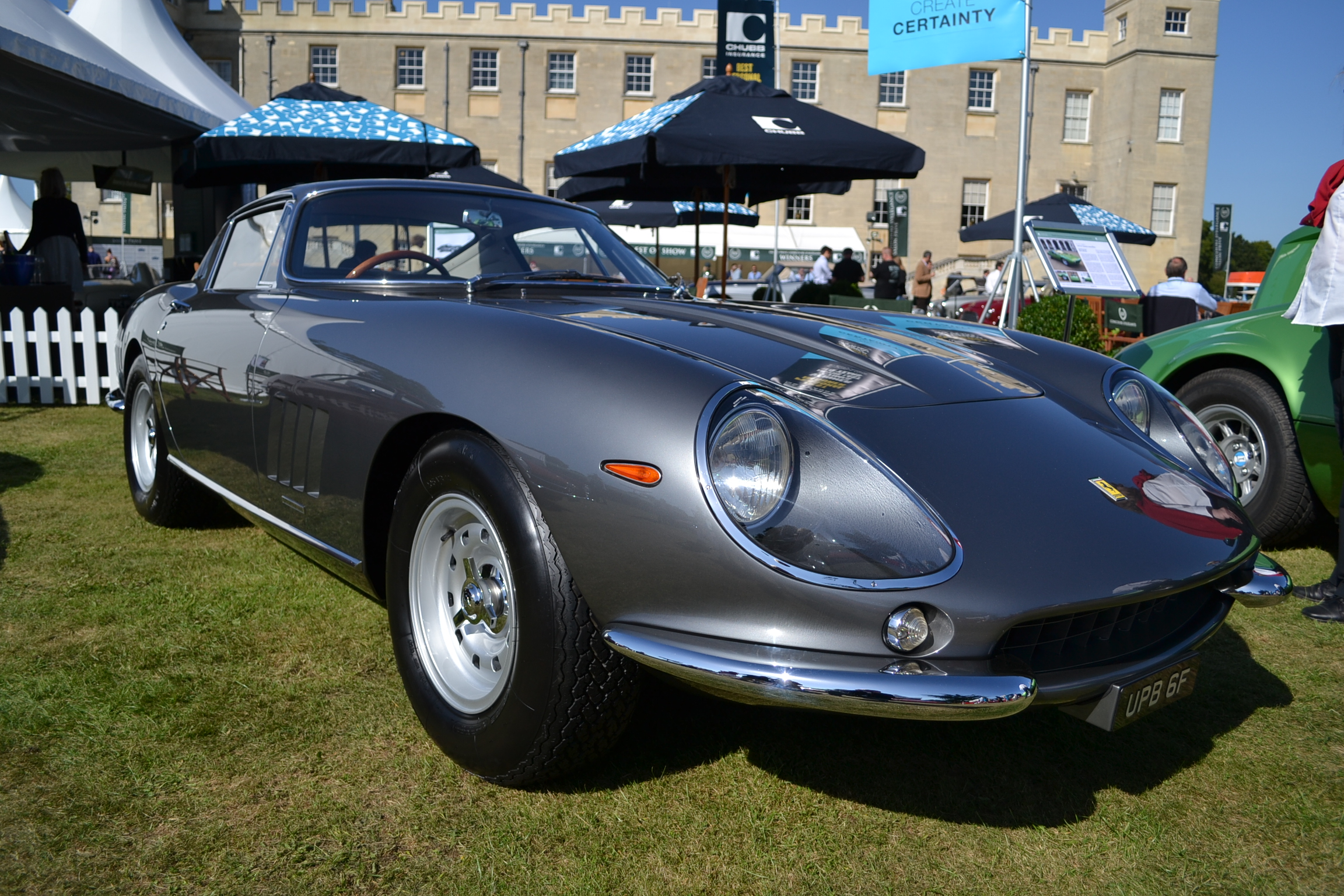 Salon Privé London 2012